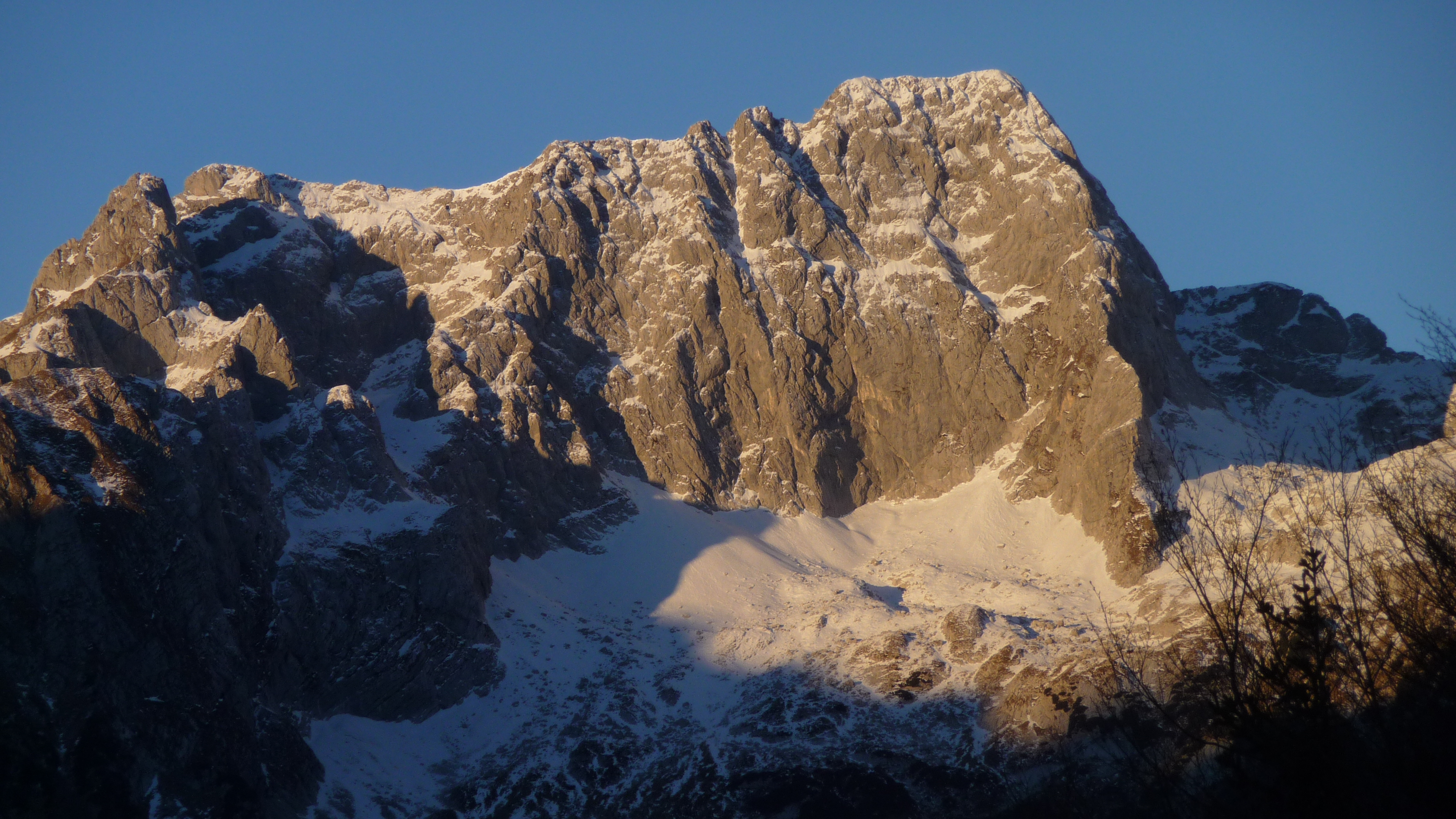 Pelc nad Klonicami (2442 m) izpod Vršiča (1611 m)